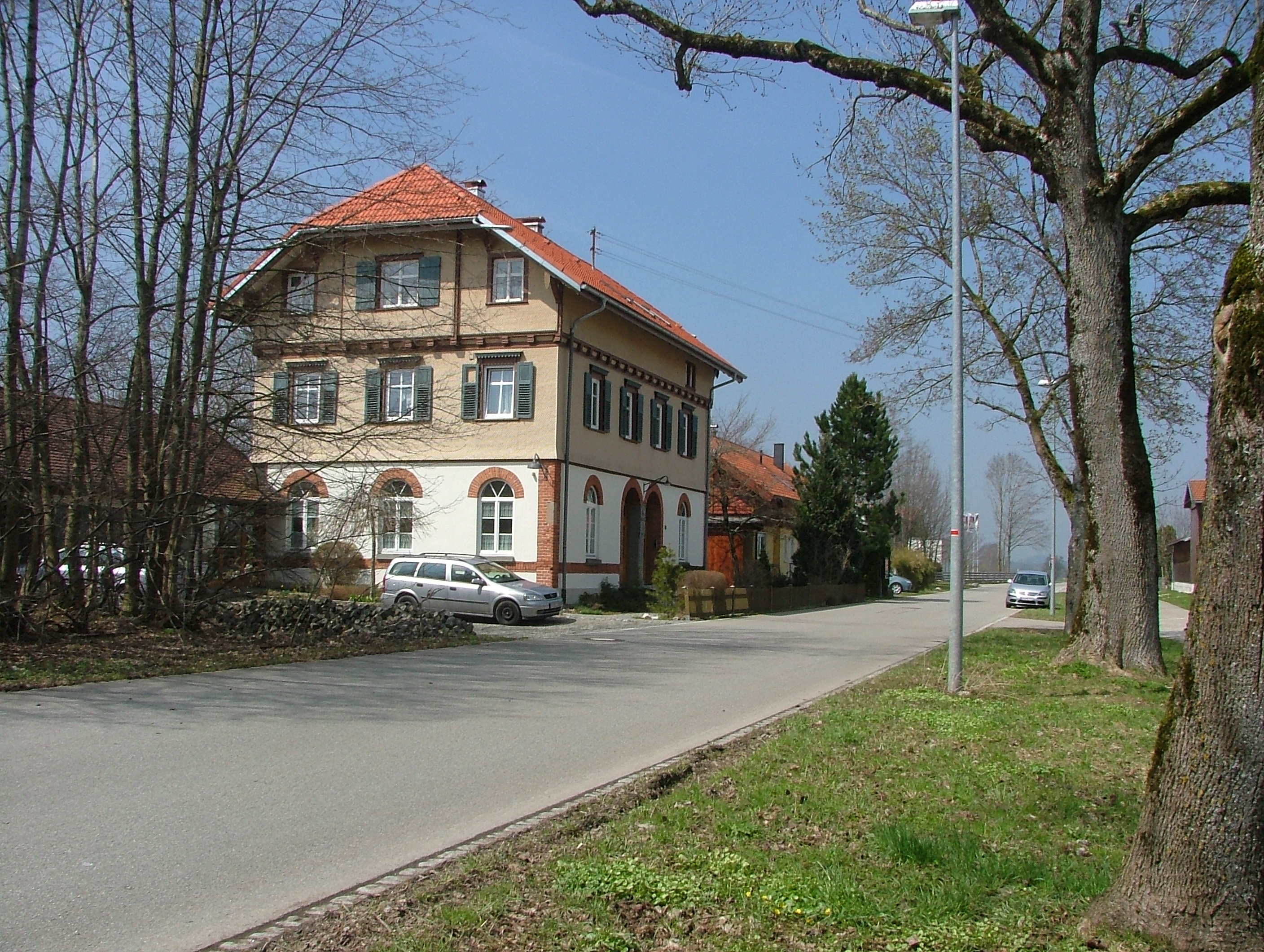 Ehemaliger Bahnhof Friesenhofen